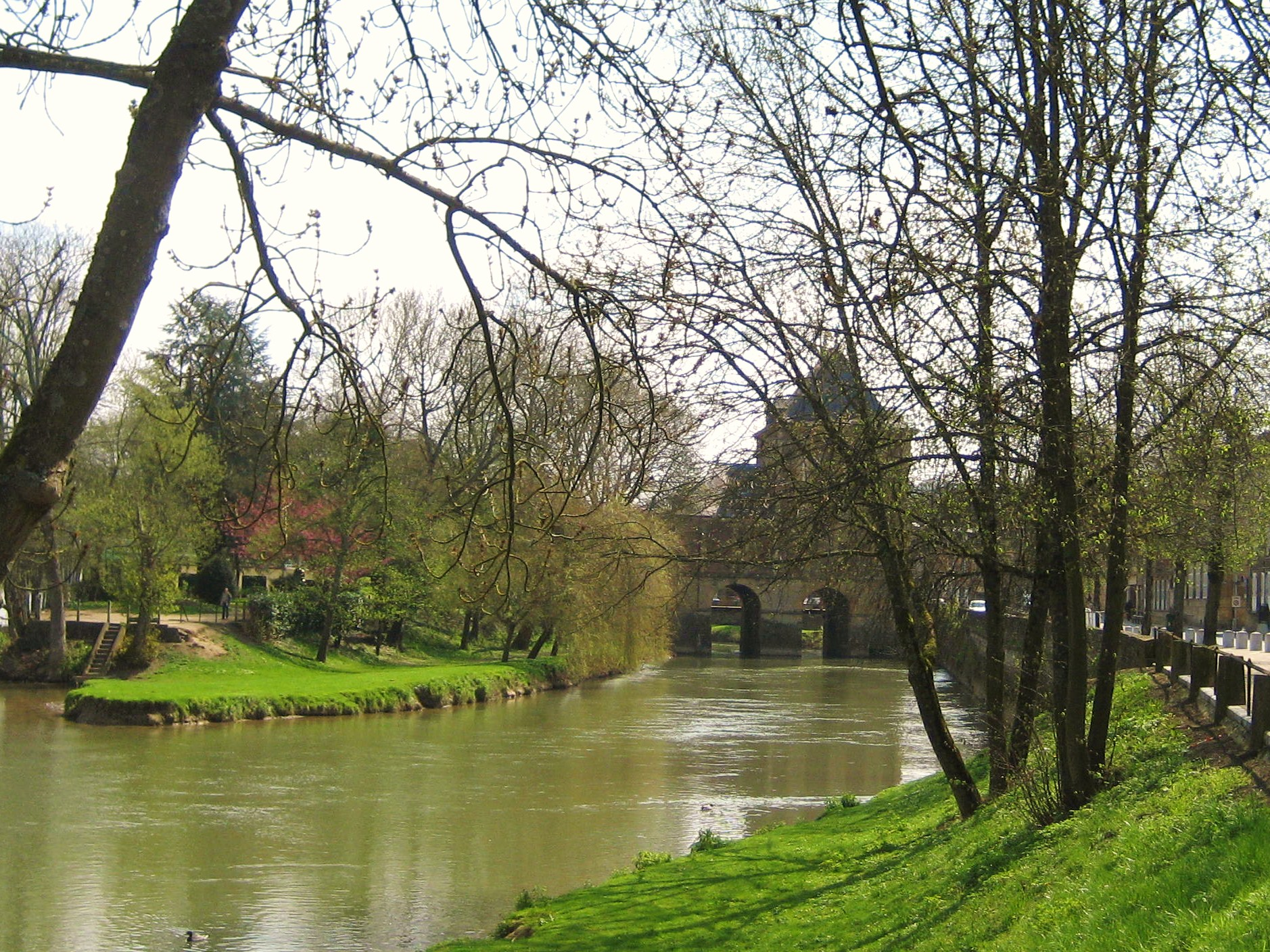 Le Grand Moulin ducal sur l'Etion